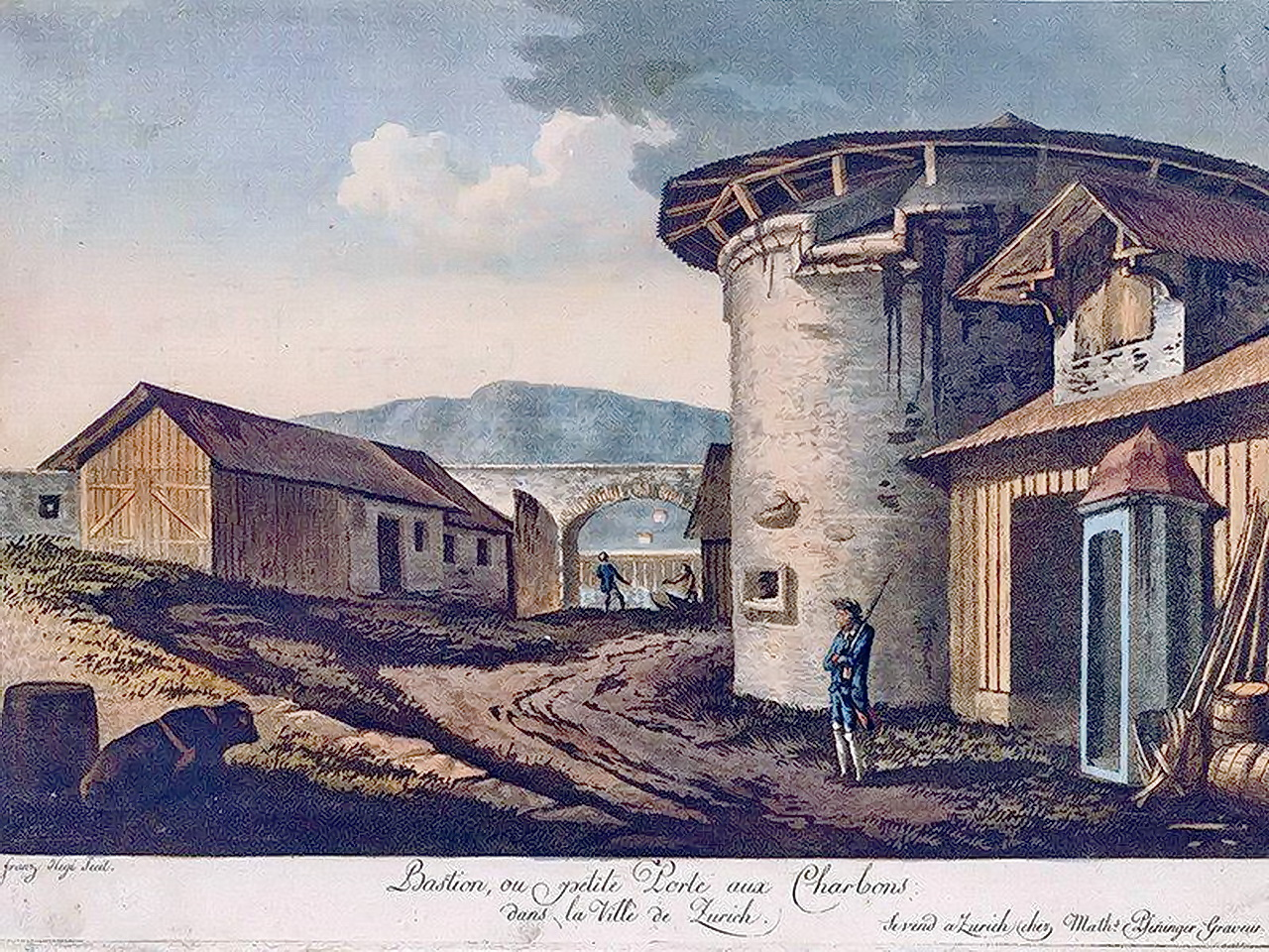 Sechseläutenplatz : Kohlepörtli“, durch das Materialtansporte vom See her getätigt wurden. Die Szenerie mit Wächter, Kuh und ankommendem Weidling ist als beschauliche Stadtrandidylle gehalten.